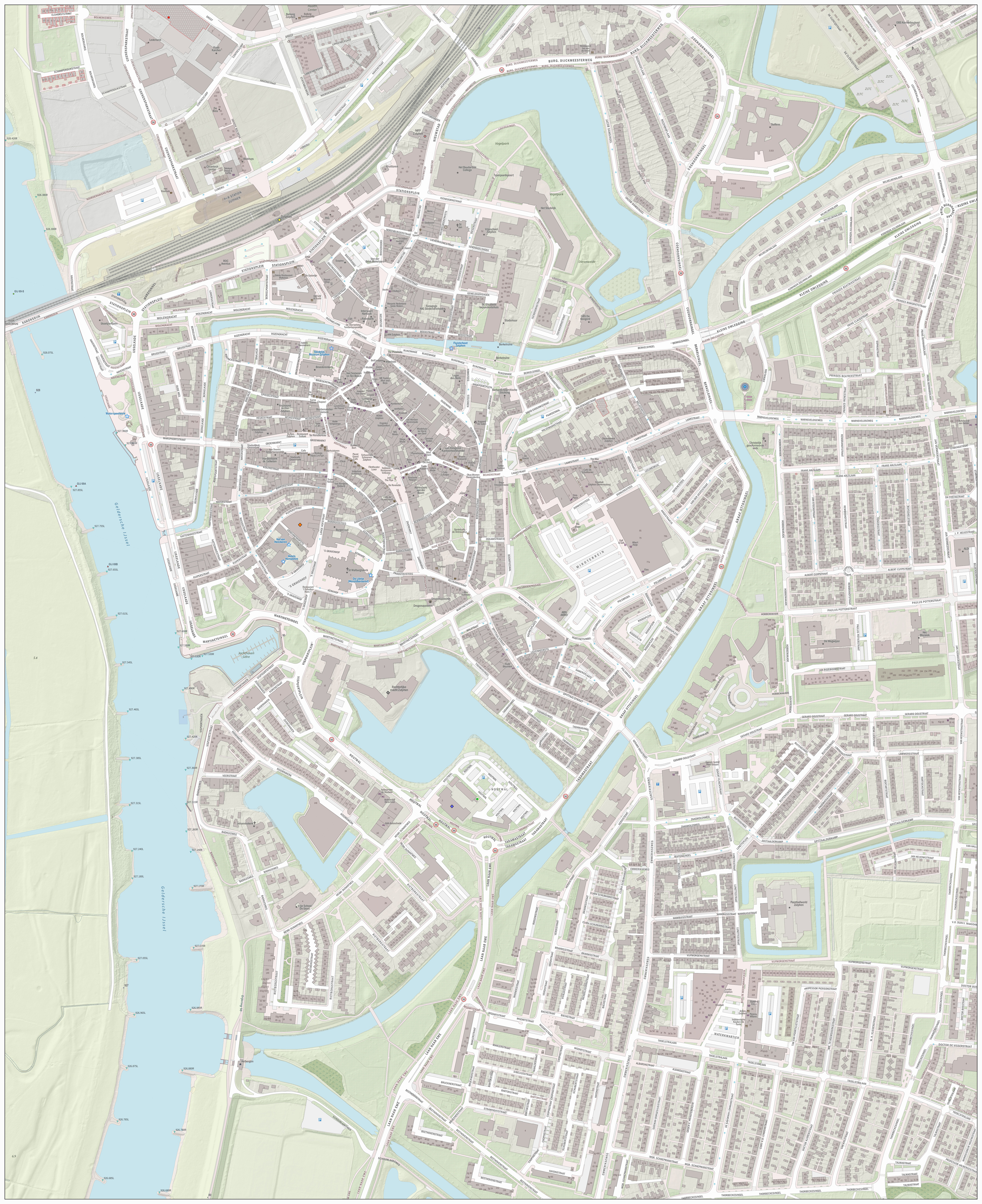 Topografische kaart van Zutphen (centrum van woonplaats). Resolutie: 2688 pixels/km. Kaartbeeld samengesteld uit de open geodata van de Basisregistratie Grootschalige Topografie (BGT), Creative Commons-BY Kadaster, en Top10NL en Top25namen (Basisregistratie Topografie, Kadaster), Creative Commons-BY Kadaster. Gebouwvlakken uit open geodata BAG extract, Creative Commons-BY Kadaster. Wegen uit de OpenStreetMap, CC-BY OpenStreetMap bijdragers. Reliëfschaduw uit de Actuele Hoogtekaart AHN2/AHN3. Samenstelling en kleurenschema: Jan-Willem van Aalst, met QGIS2. Zie ook de Legenda.